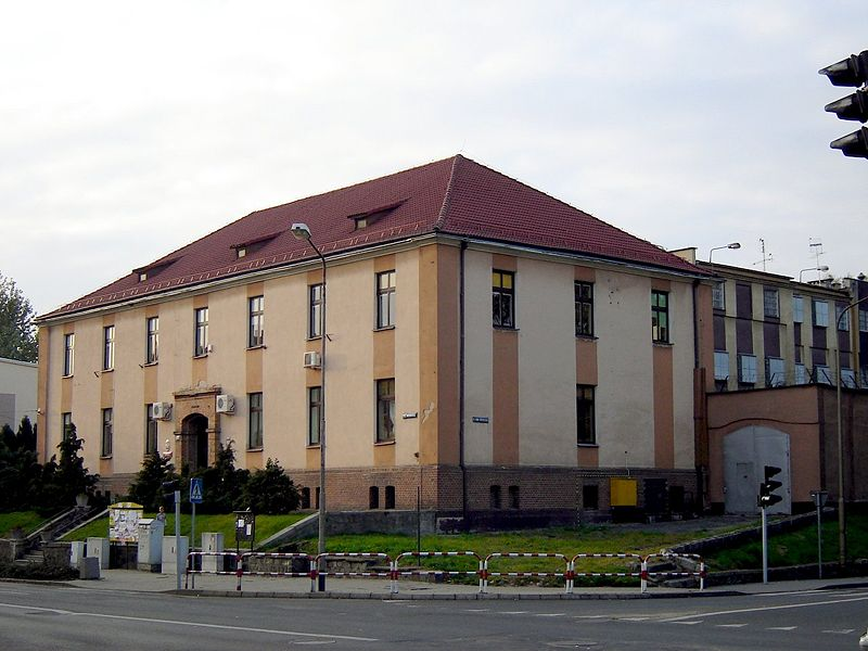 Budynek sądu w Choszcznie